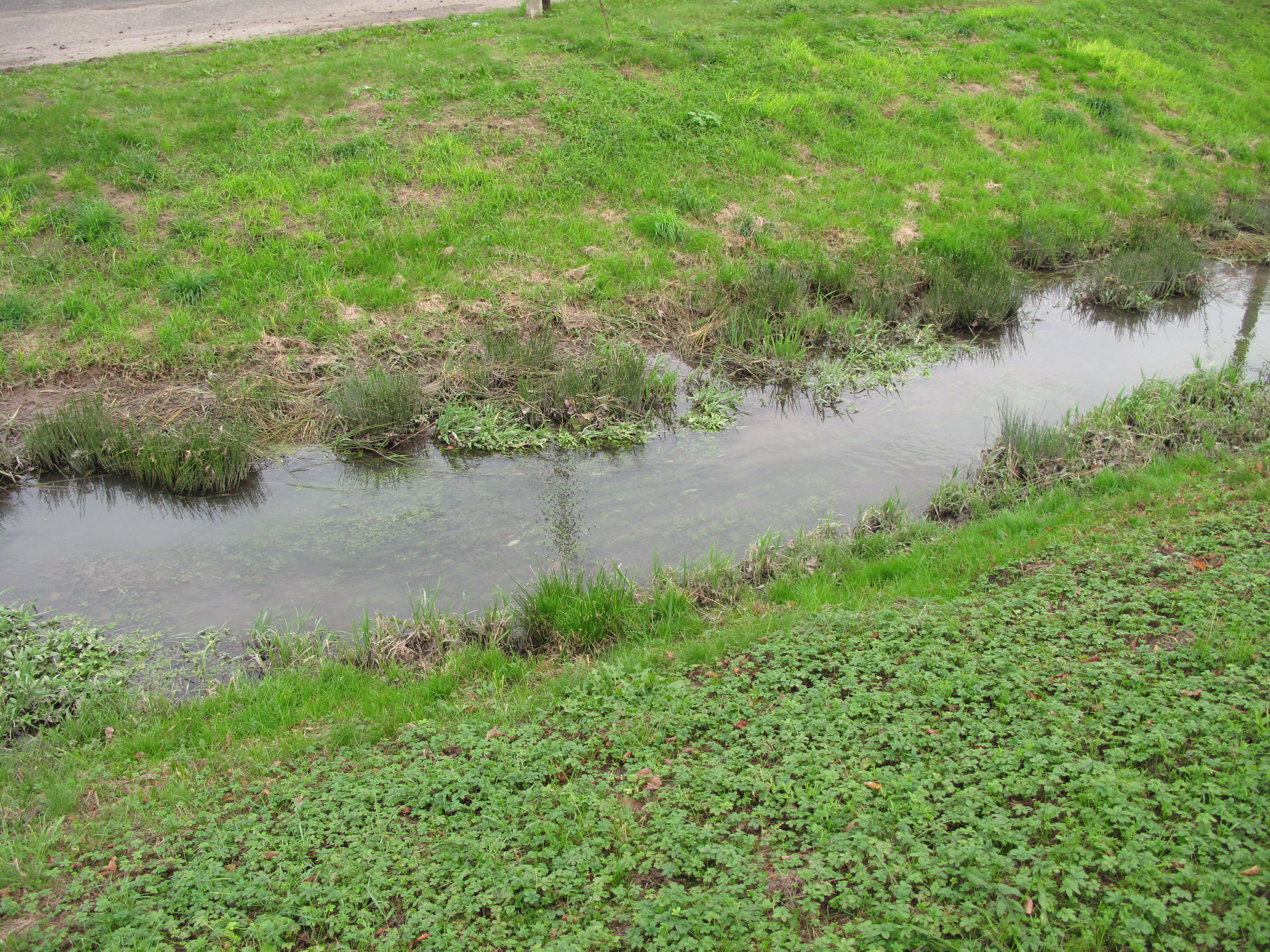 Potok ve Střížovicích. Okres Litoměřice, Česká republika.